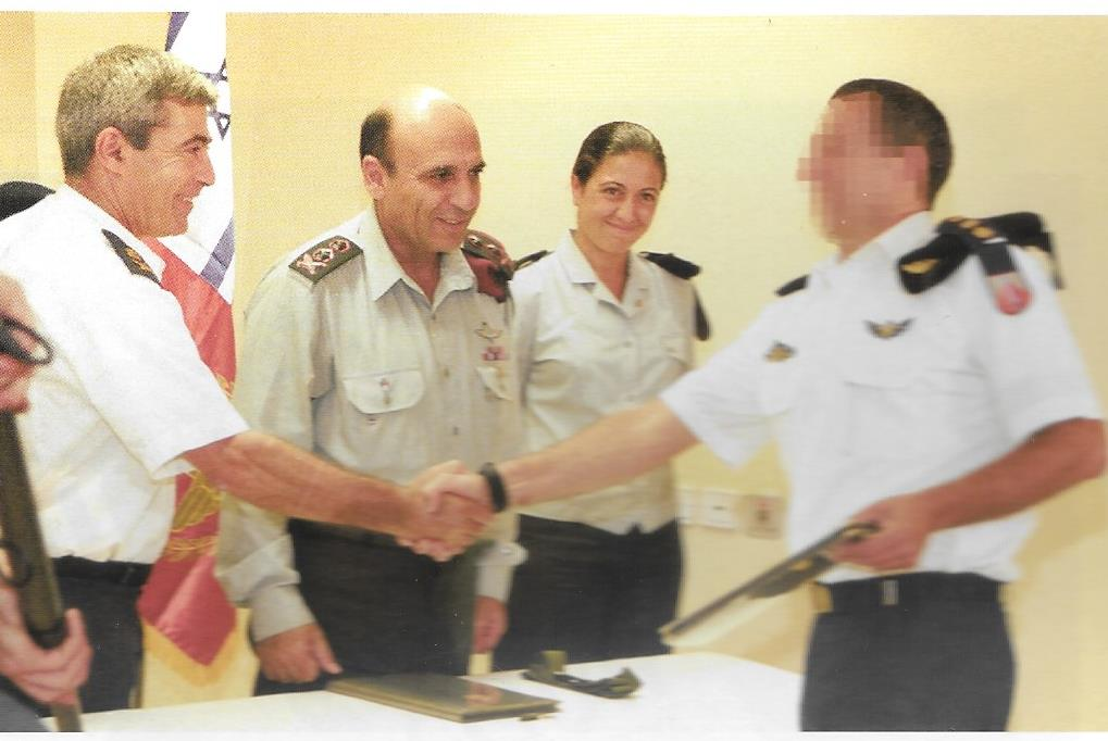 הרמטכ"ל שאול מופז במרכז מעניק ציון לשבח לשייטת 13 למפקדה רם רוטברג, משמאל אלוף ידידיה יערי, יוני 2002